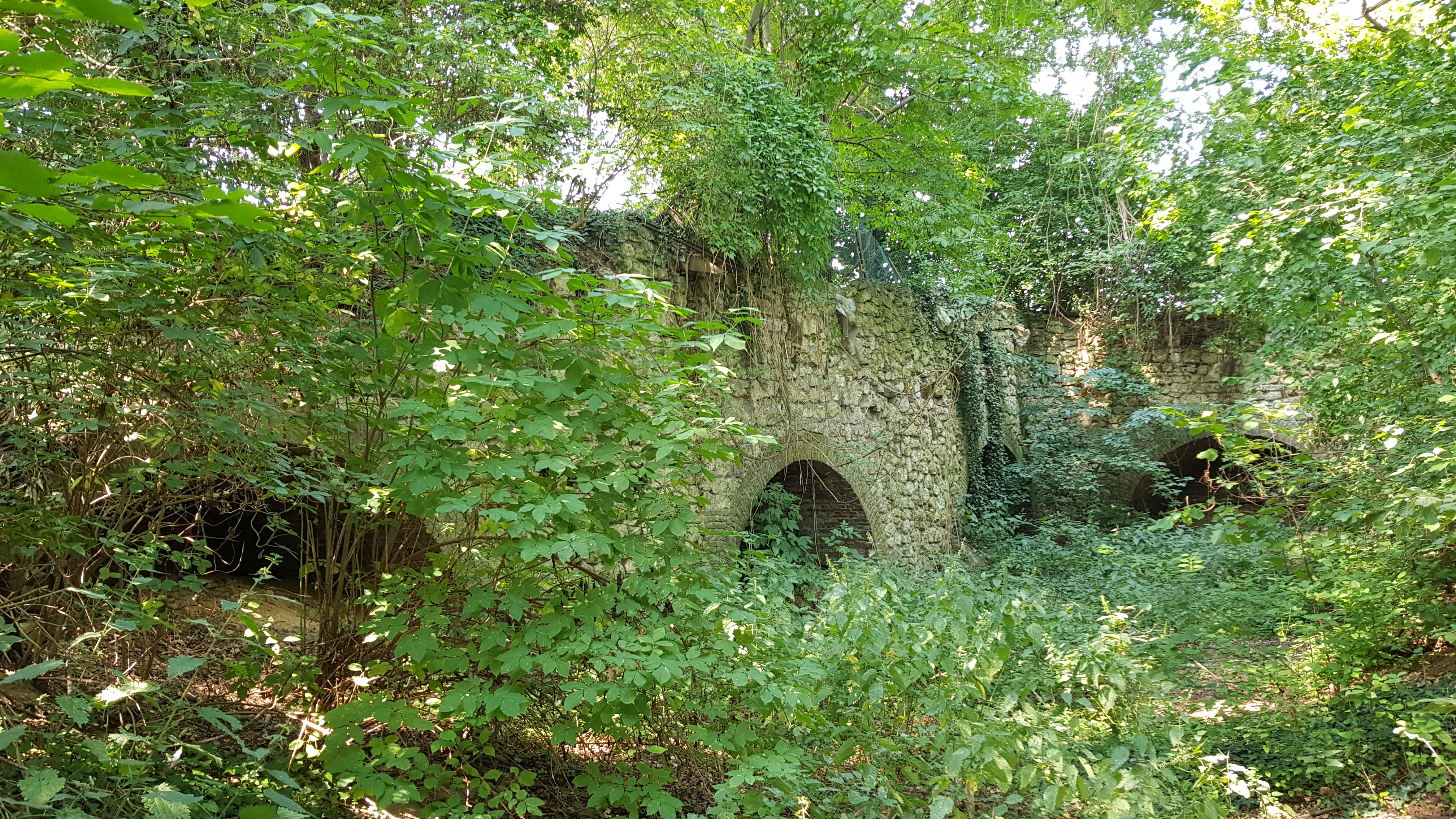 Kalkoven Amerikaanse Branderij, Kunrade, Nederland